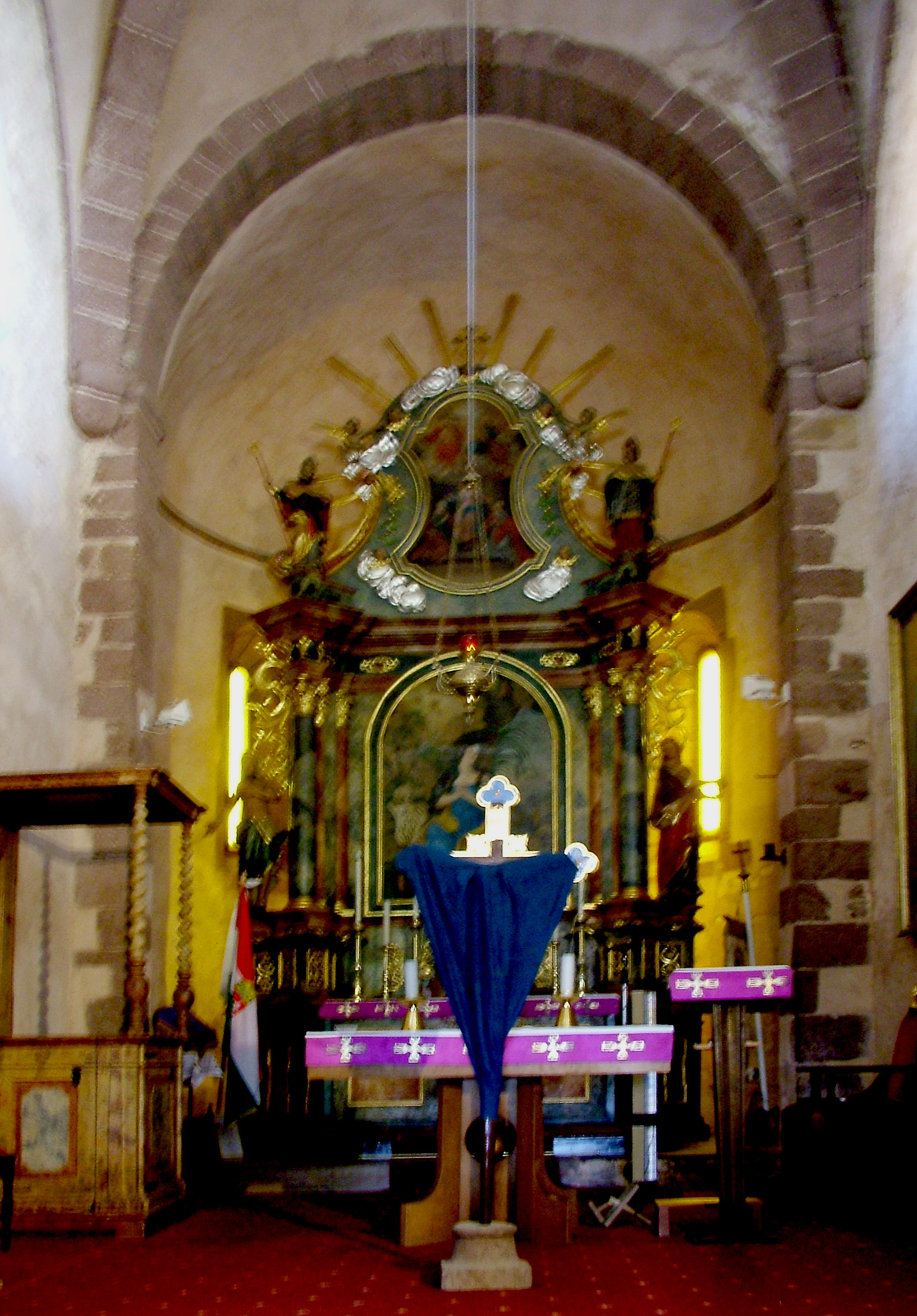 A felsőörsi Mária Magdolna-templom főhajója